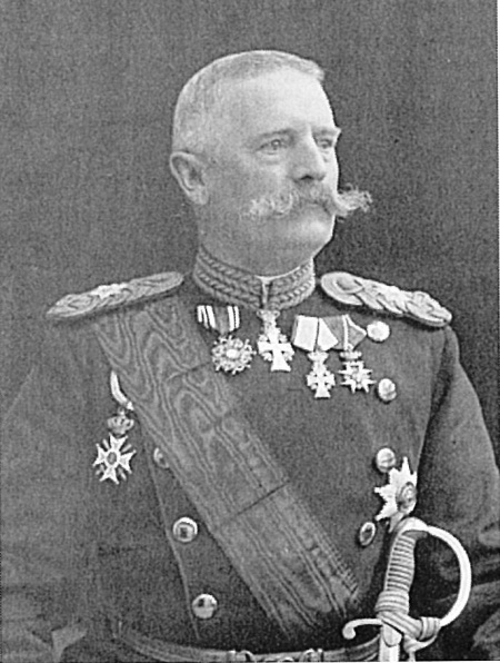 Arnold August Blichert Kühnel (1850-1908), Danish general. Photo in Rigsarkivet.